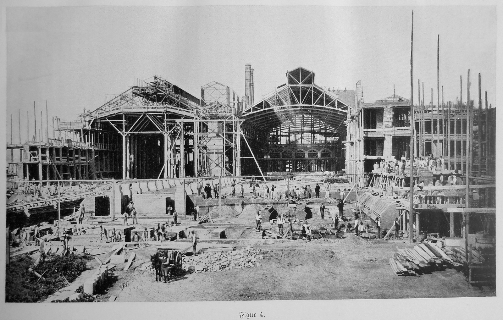 Gasometer Simmering: Figur 4. Bau Ofenhaus